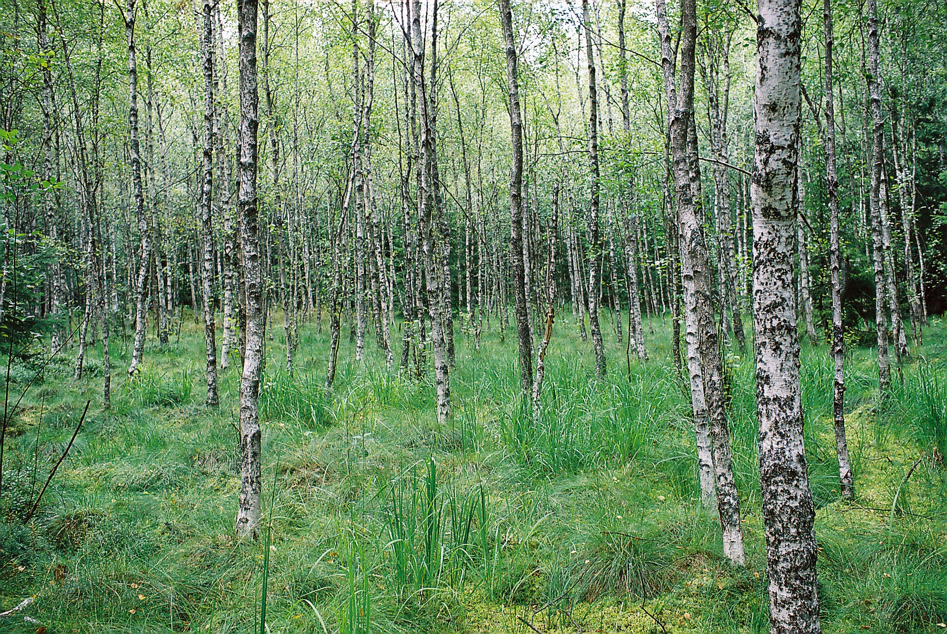 Autor: Adrian Grzegorz Rok wykonania: 2005